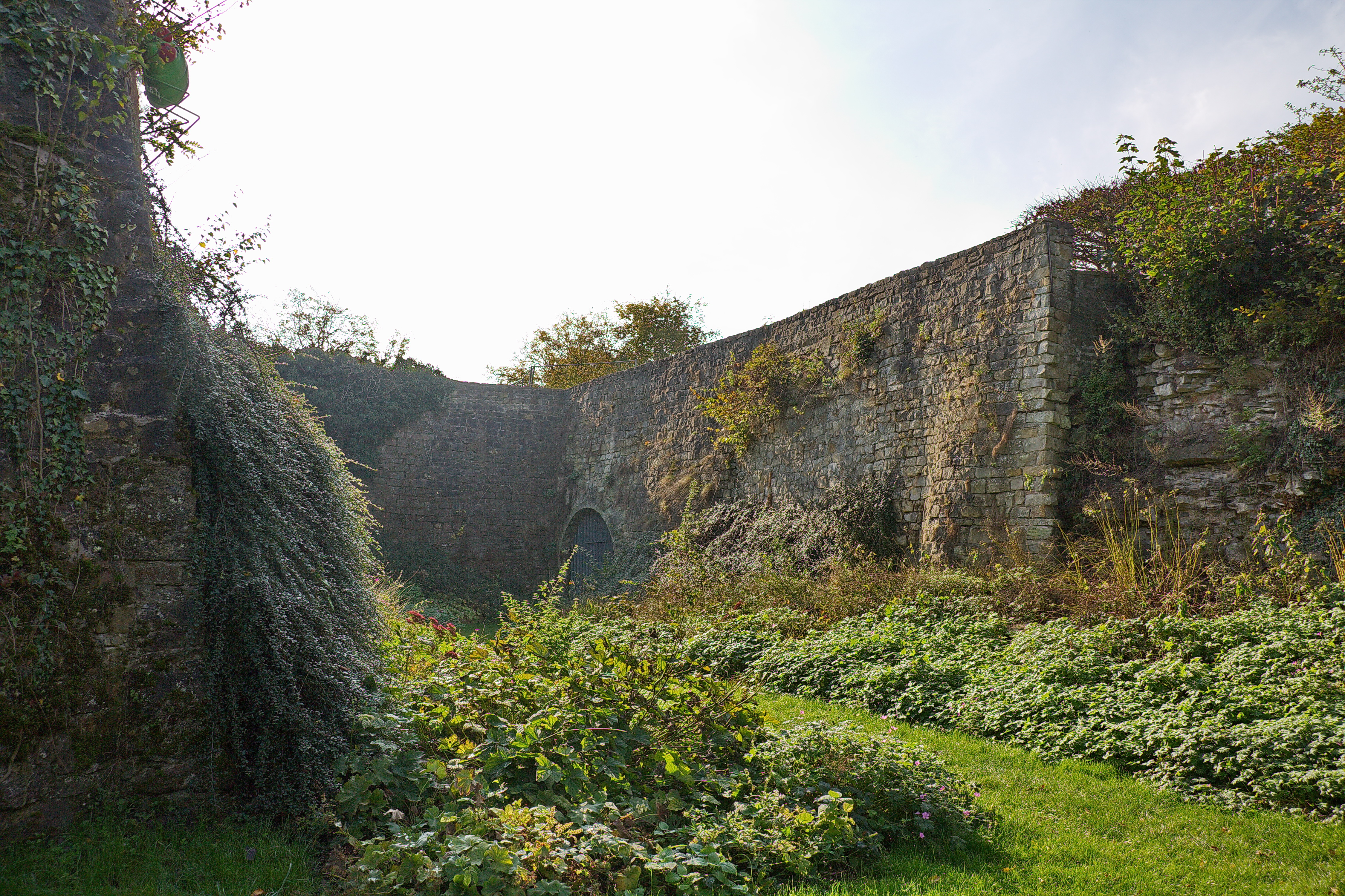 Schloss Landestrost in Neustadt am Rübenberge, Niedersachsen, Deutschland